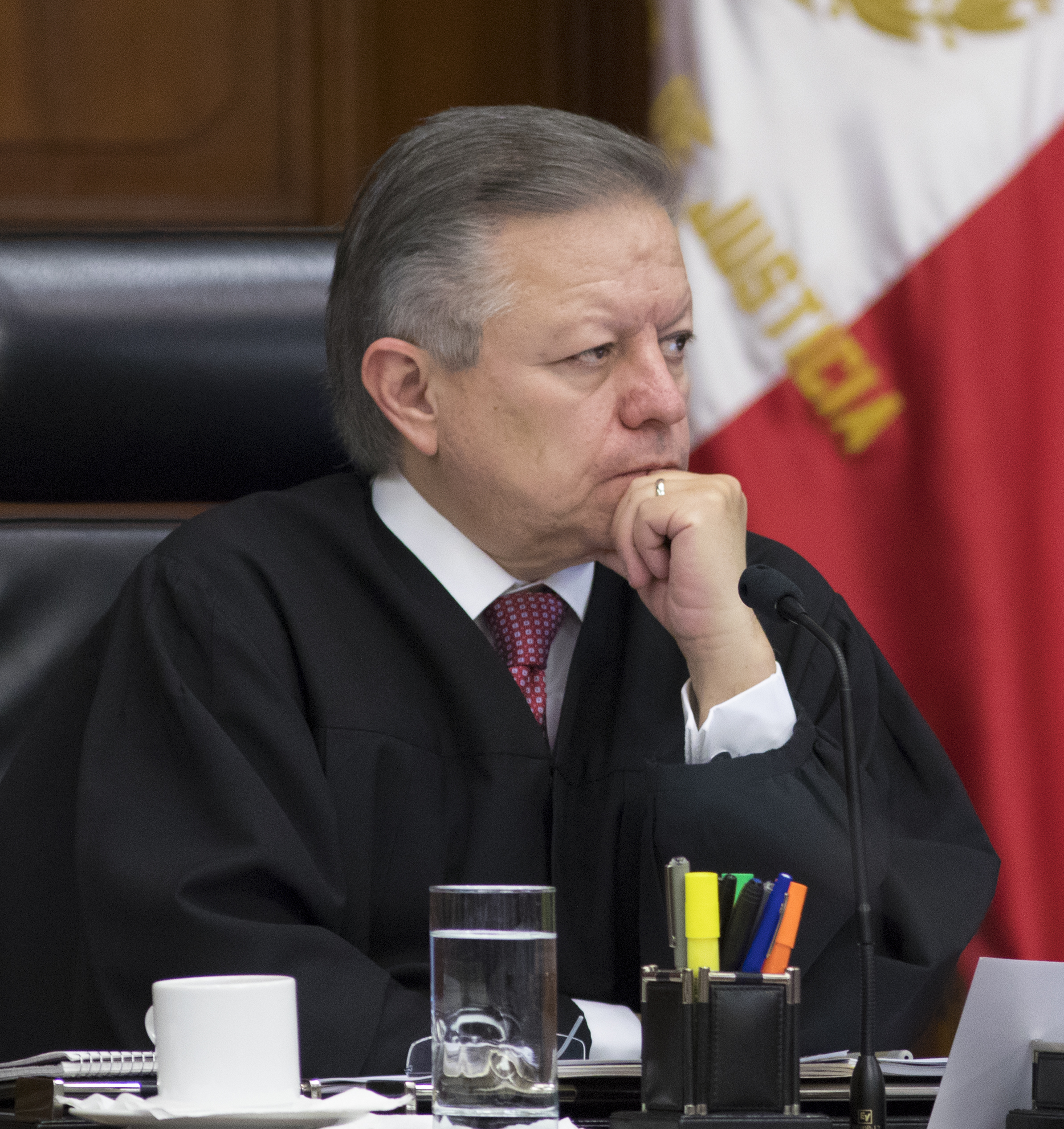 Ministro Presidente de la SCJN